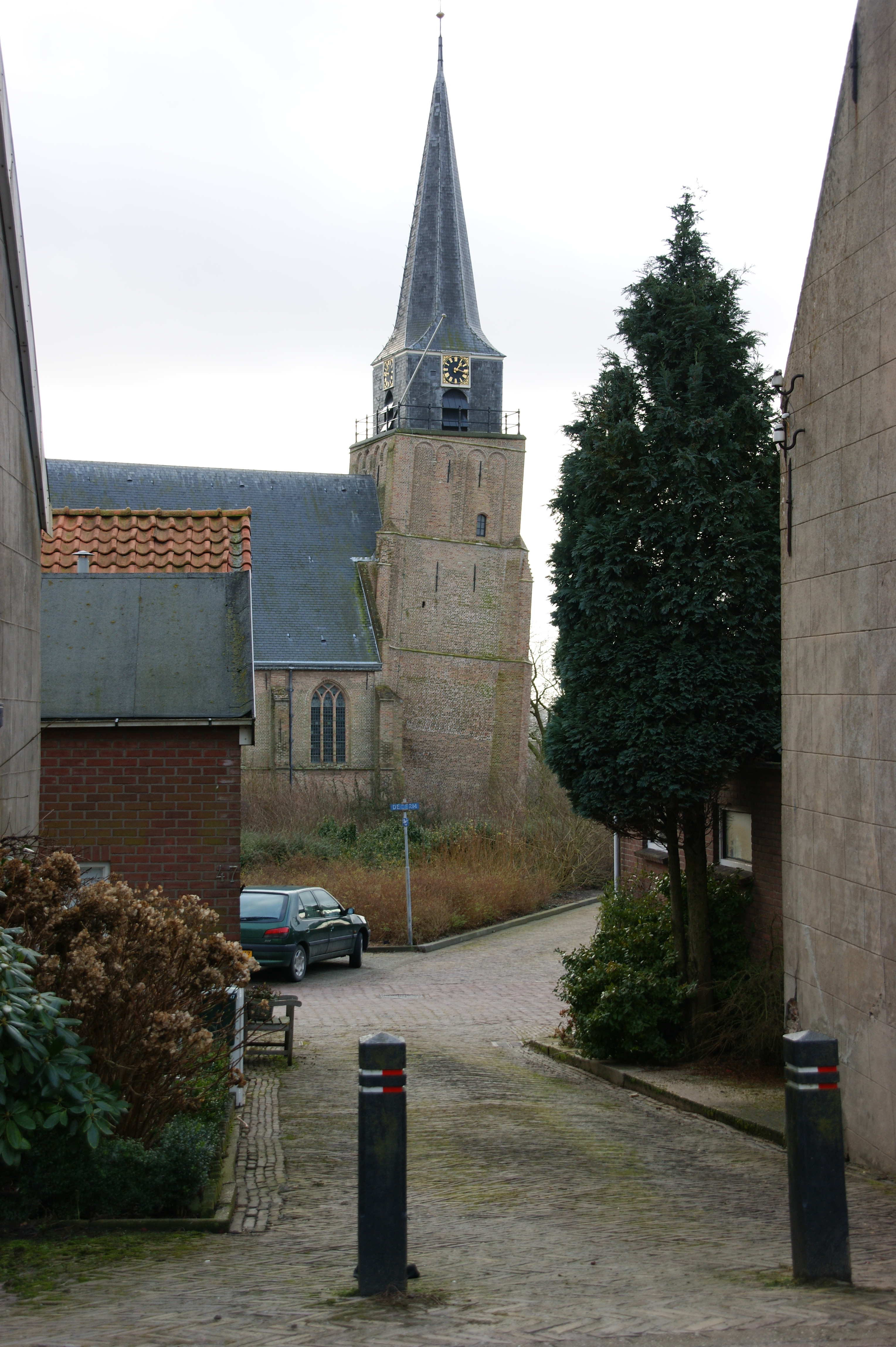 Nederlands Hervormde Kerk te Heinenoord, gebouwd in de 15e eeuw. De toren is schever dan de Toren van Pisa maar de spits is er in 1772 loodrecht opgezet.